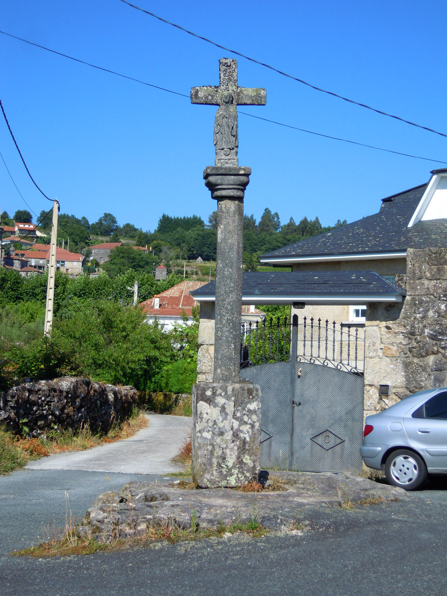 Cruceiro das Boliñas (Aguasantas, Cerdedo-Cotobade).